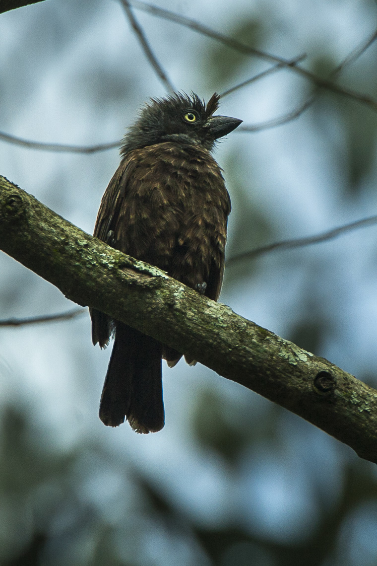 Gray-throated Barbet - Kakamega Kenya 06_1744